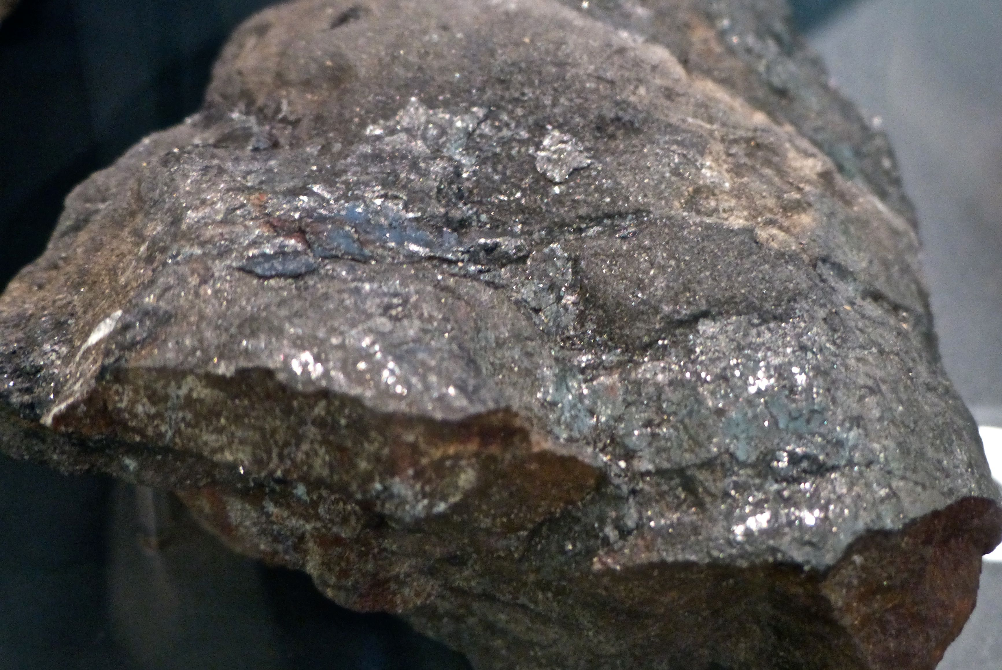 oberkarbonischer Kohleneisenstein aus dem Ruhrgebiet (Sprockhövel)